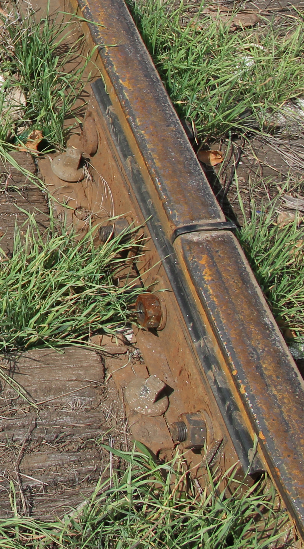 Isolant électrique de rail à la limite entre voie SNCF et voie portuaire